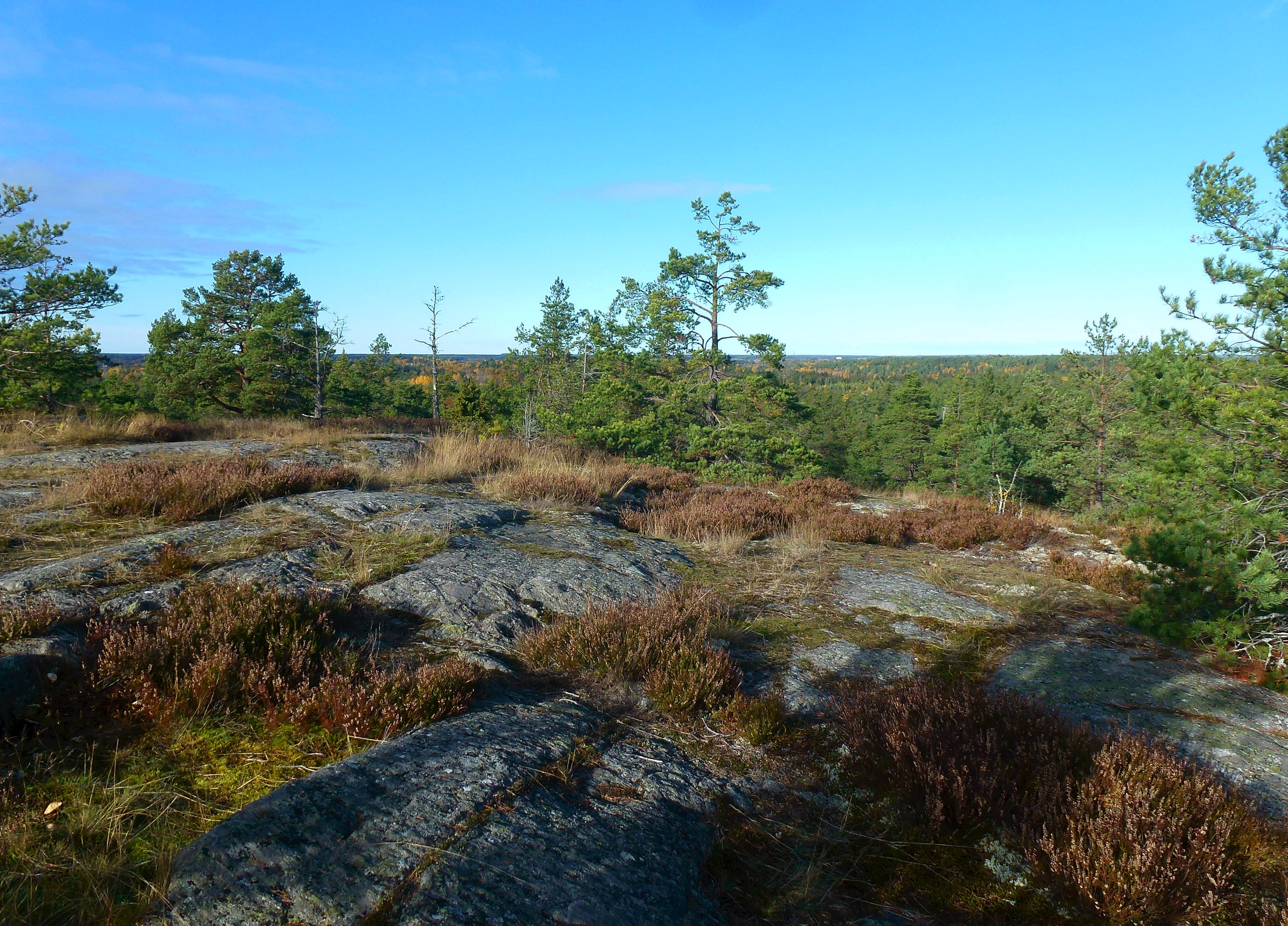 Himlaberget i Velamsunds naturresrevat, Nacka kommun